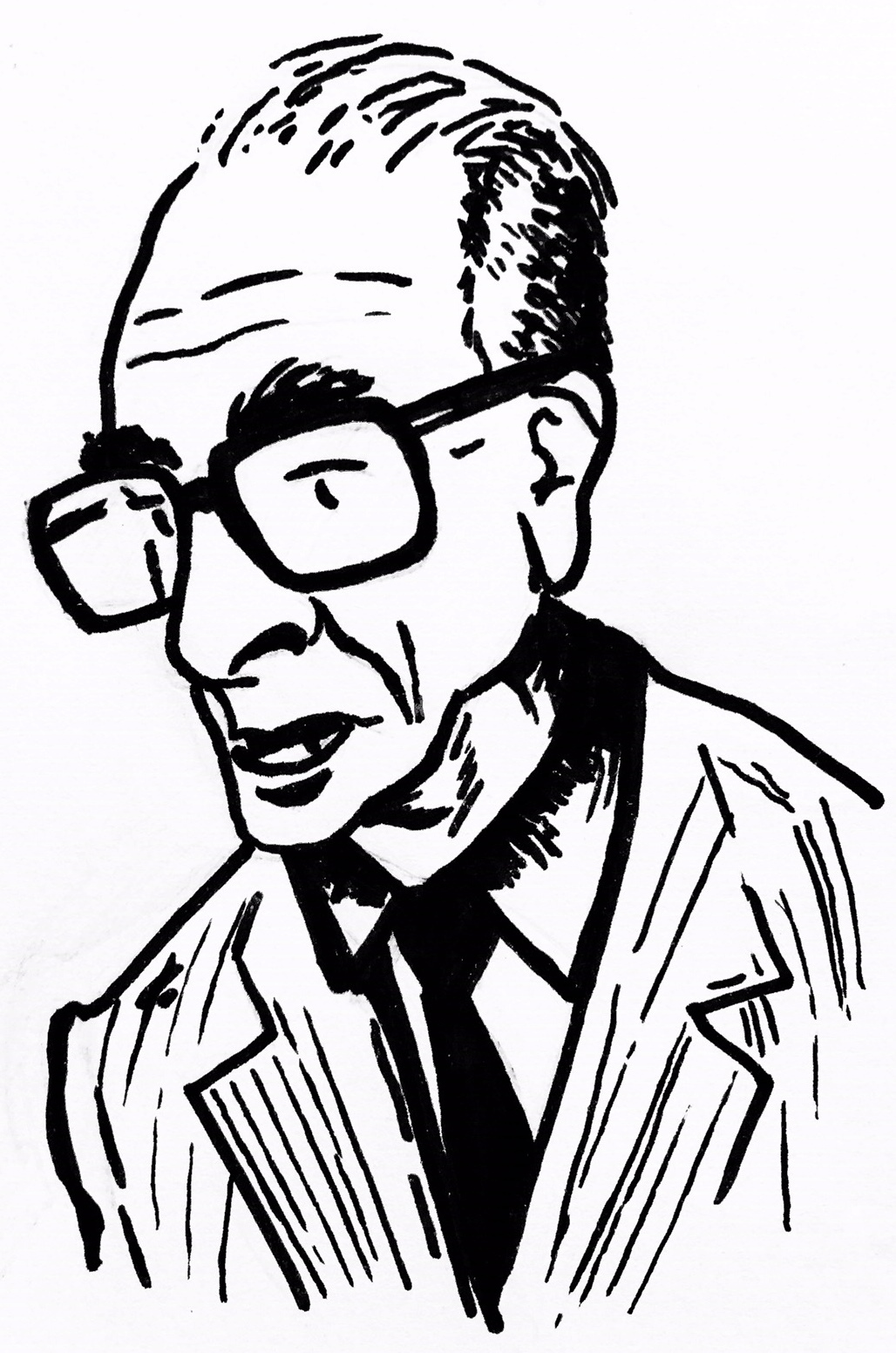 Xaquín Lorenzo, escritor e antropólogo galego.